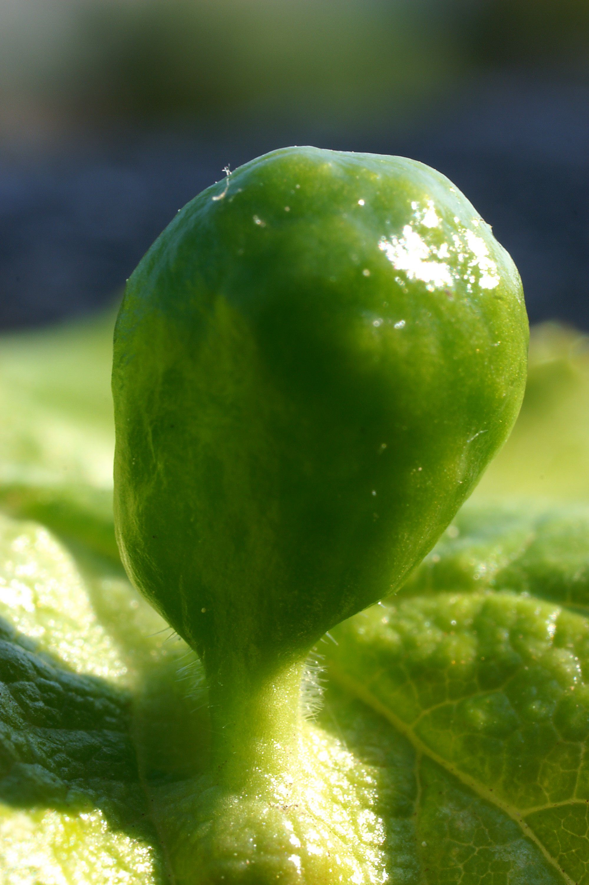 Blattgalle der Byrsocrypta ulmi Tetraneura ulmi, Ulmenblasenlaus, Ulmengalllaus an einer Goldulme.